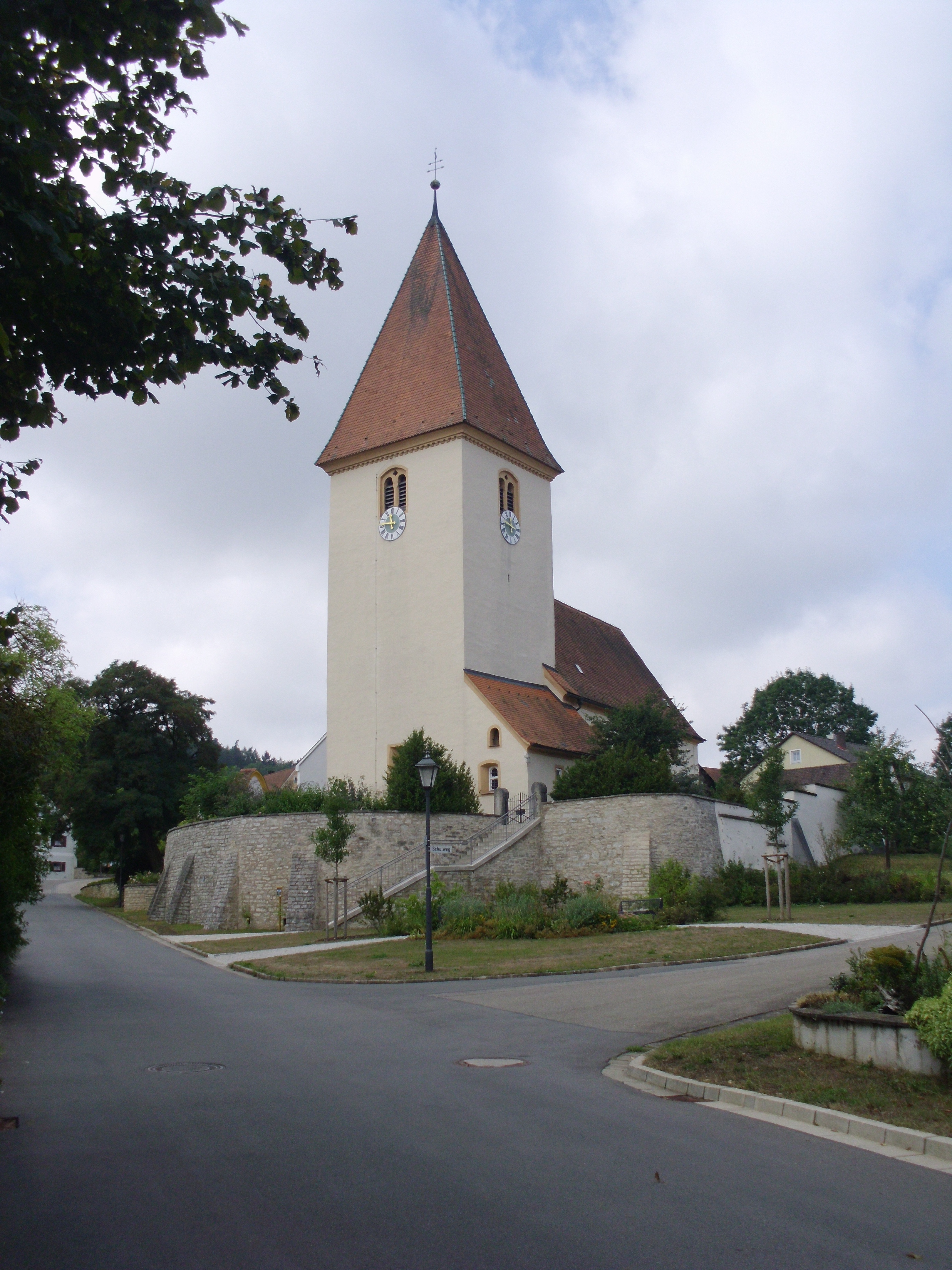 Großhöbing, Ortsteil der Stadt Greding im mittelfränkischen Landkreis Roth in Bayern, Kath. Pfarrkirche St. Johannes Evangelist